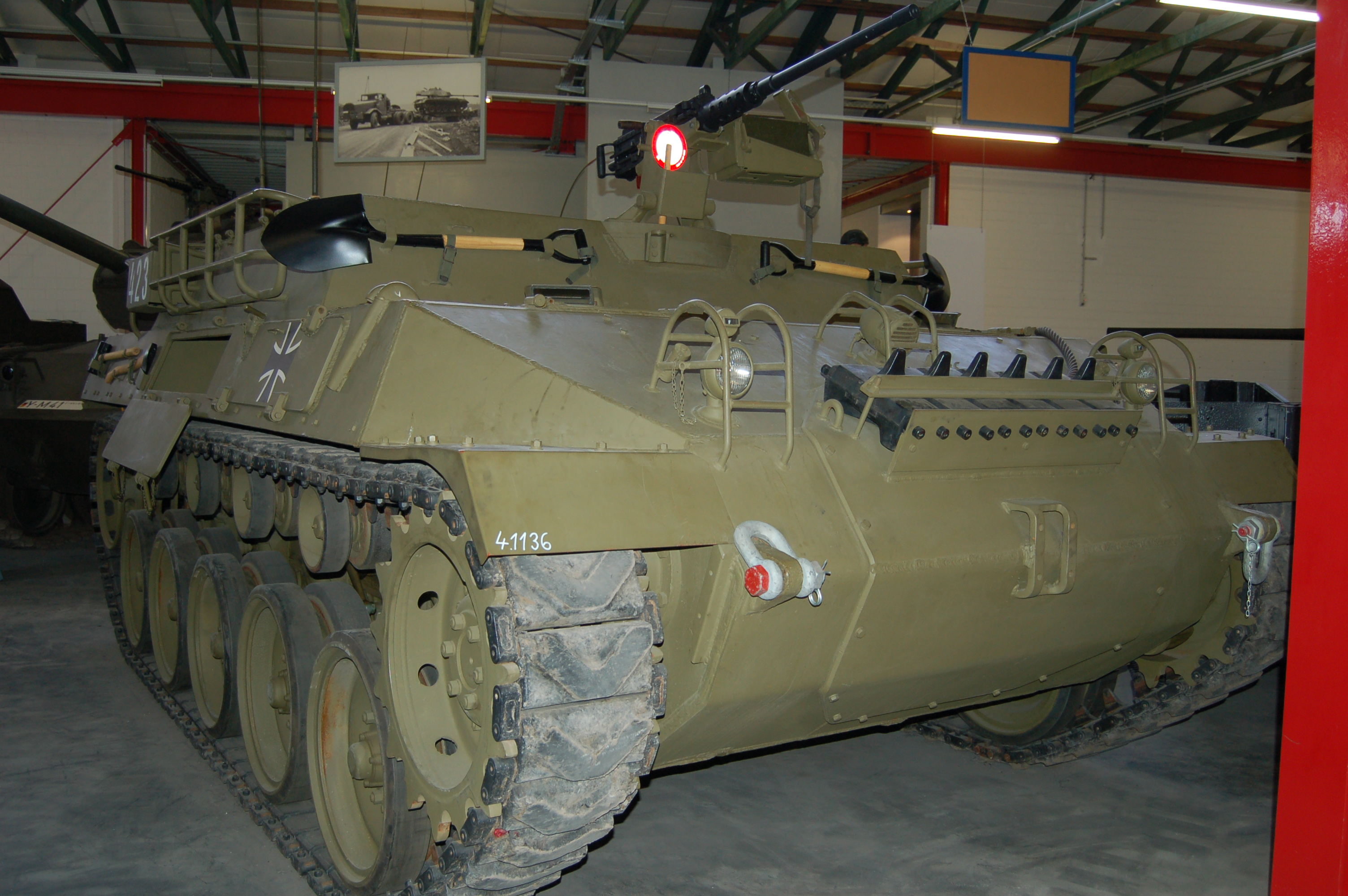 Schützenpanzer M 39 Besatzung: 2 + 8 Soldaten Gewicht: 16,8 Tonnen Motorleistung: 266 kW (360 SAE-PS)